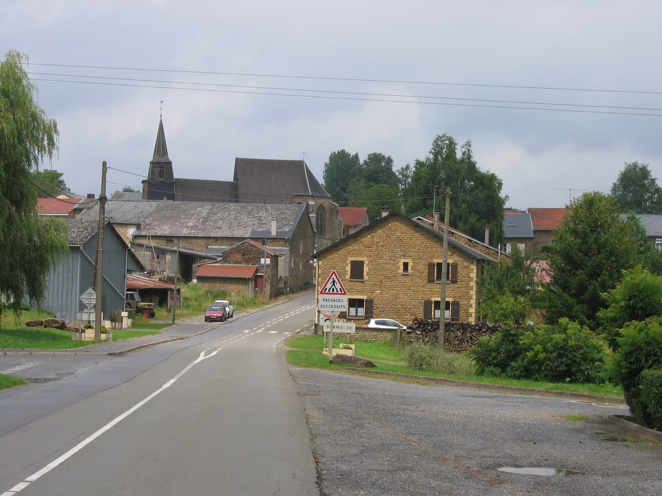 ormonne, en Ardennes, France